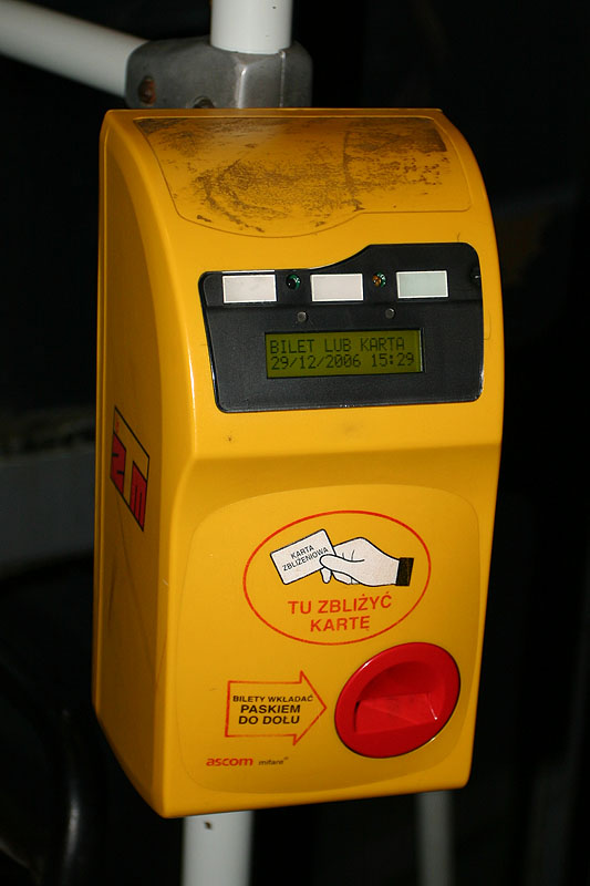 Kasownik ZTM Warszawa, autor zdjęcia: Bartłomiej Międzybrodzki